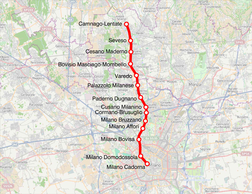 Mappa della linea S4 del servizio ferroviario suburbano di Milano.